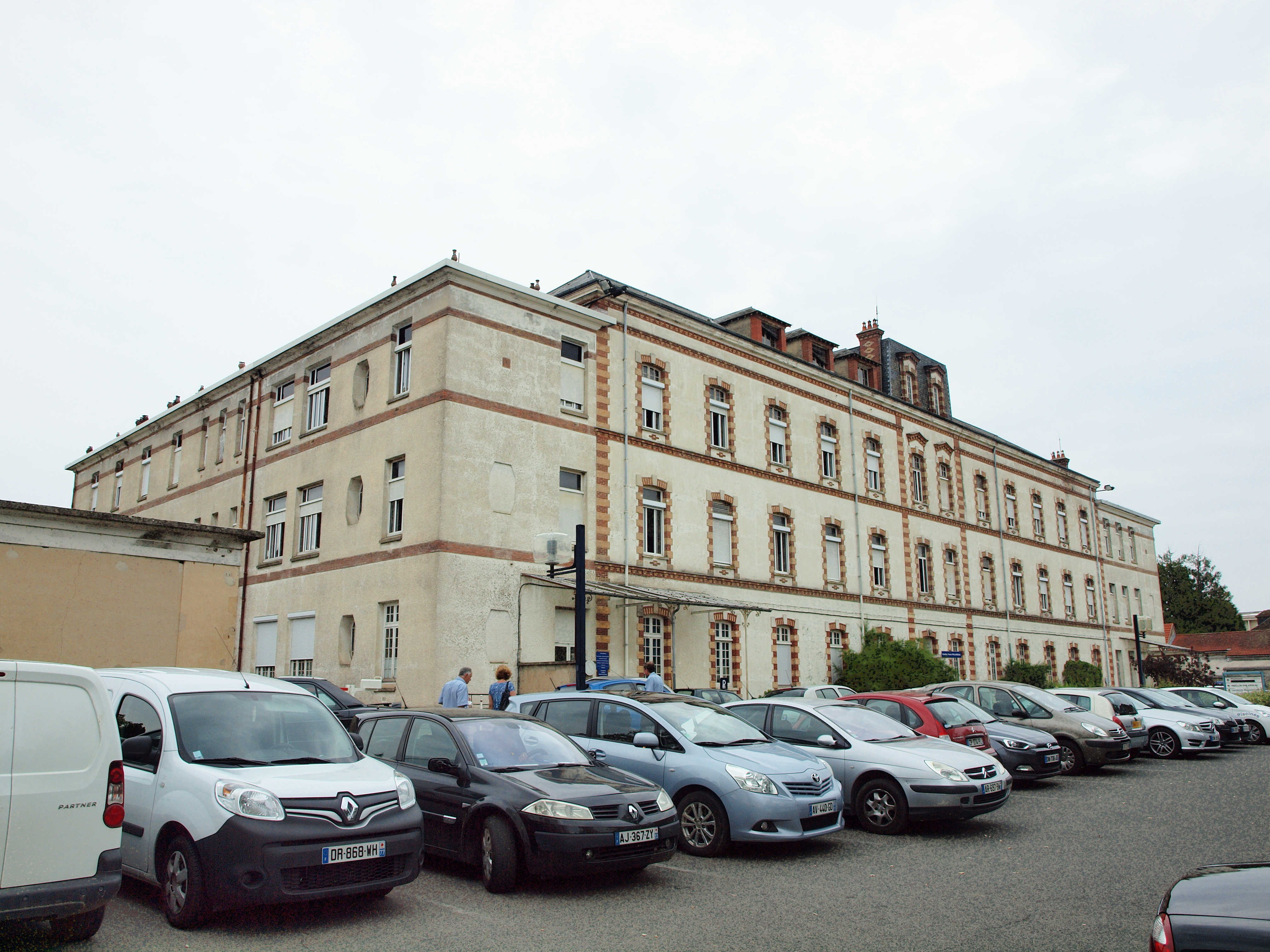 Centre hospitalier de Fontainebleau (Seine-et-Marne, France)